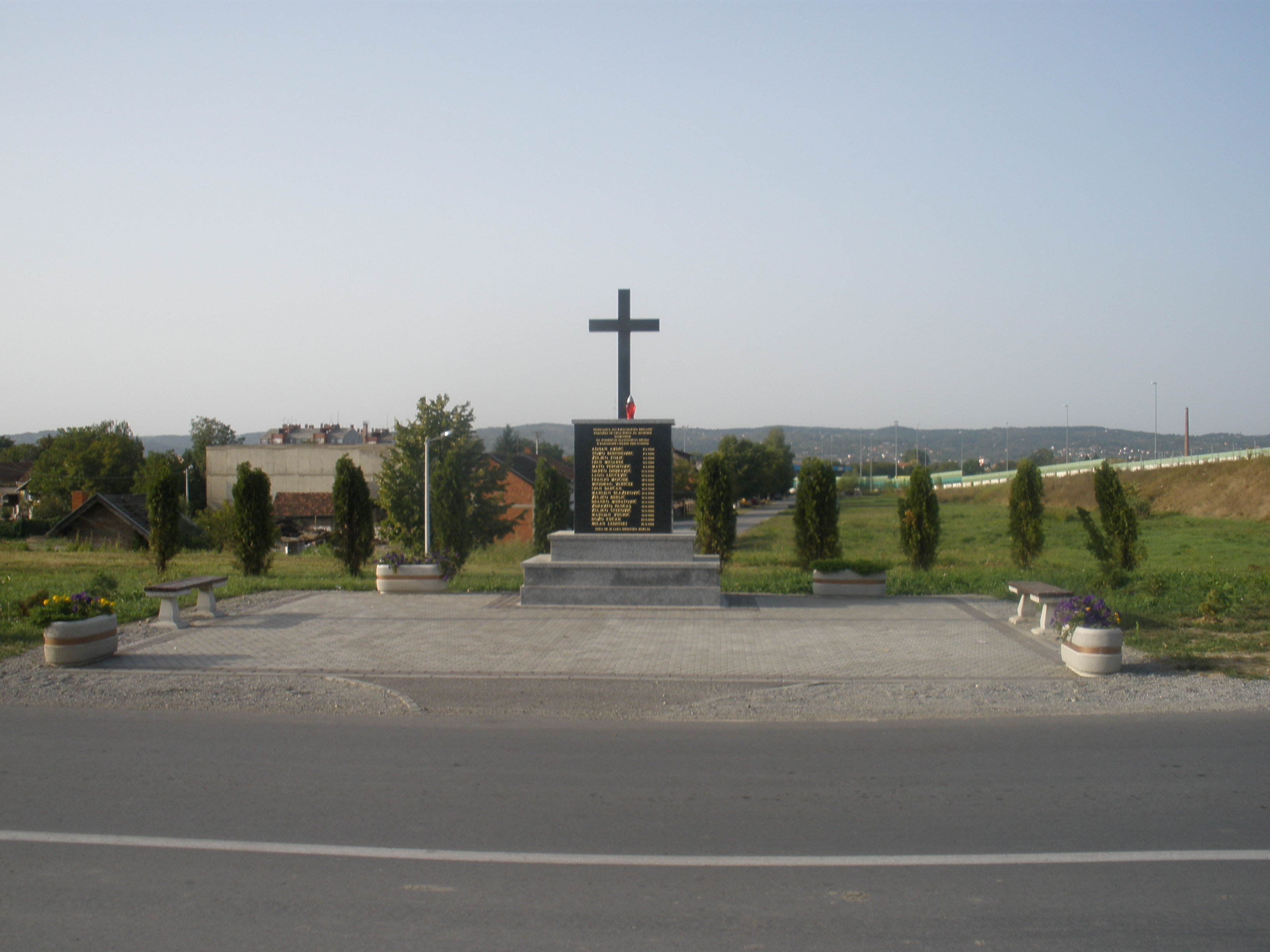 Spomenik poginulim braniteljima iz Bjelovarsko-bilogorske županije u Slavonskome Brodu.